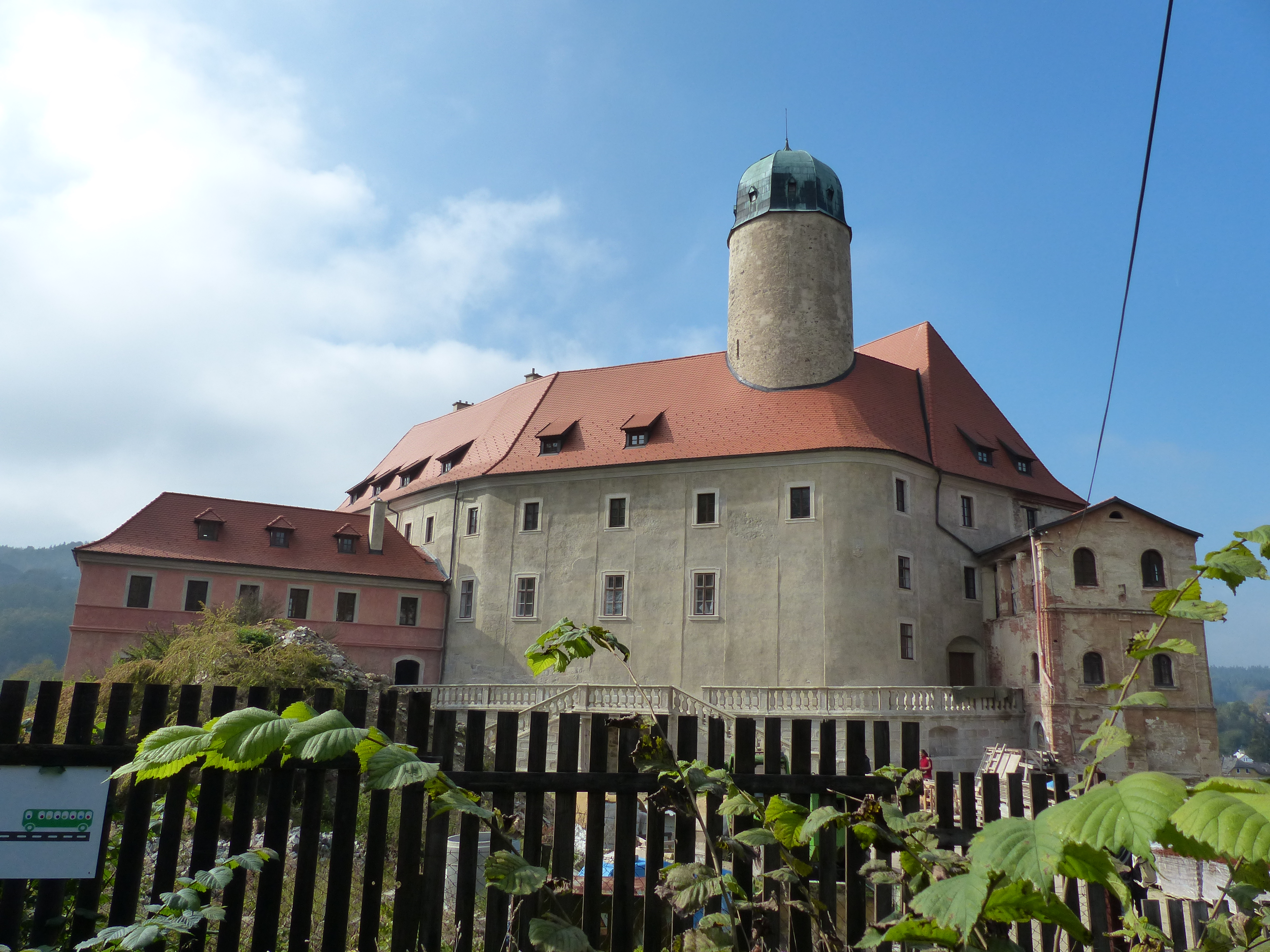 Ansicht von Schloss Libá